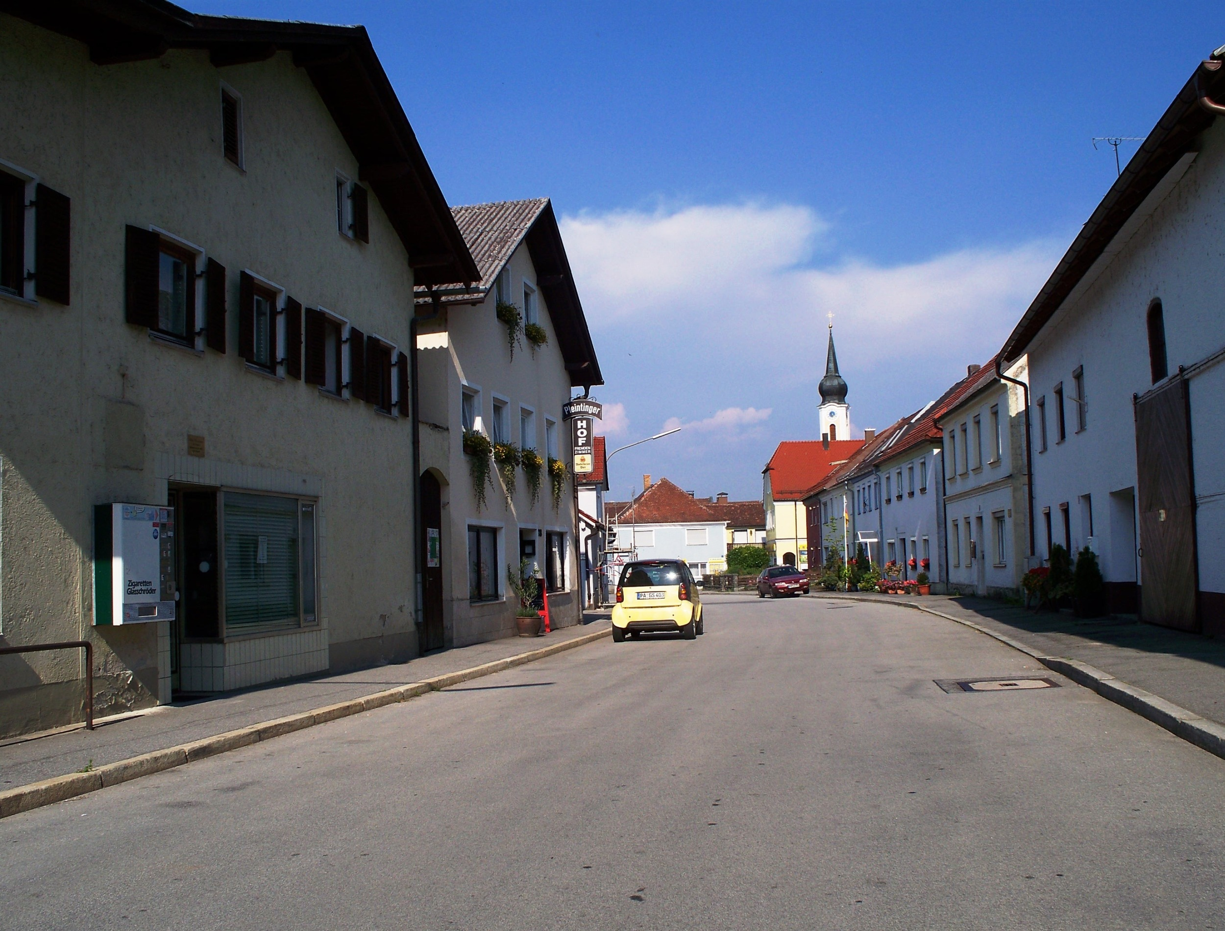 Pleinting, ein Ortsteil von Vilshofen an der Donau.